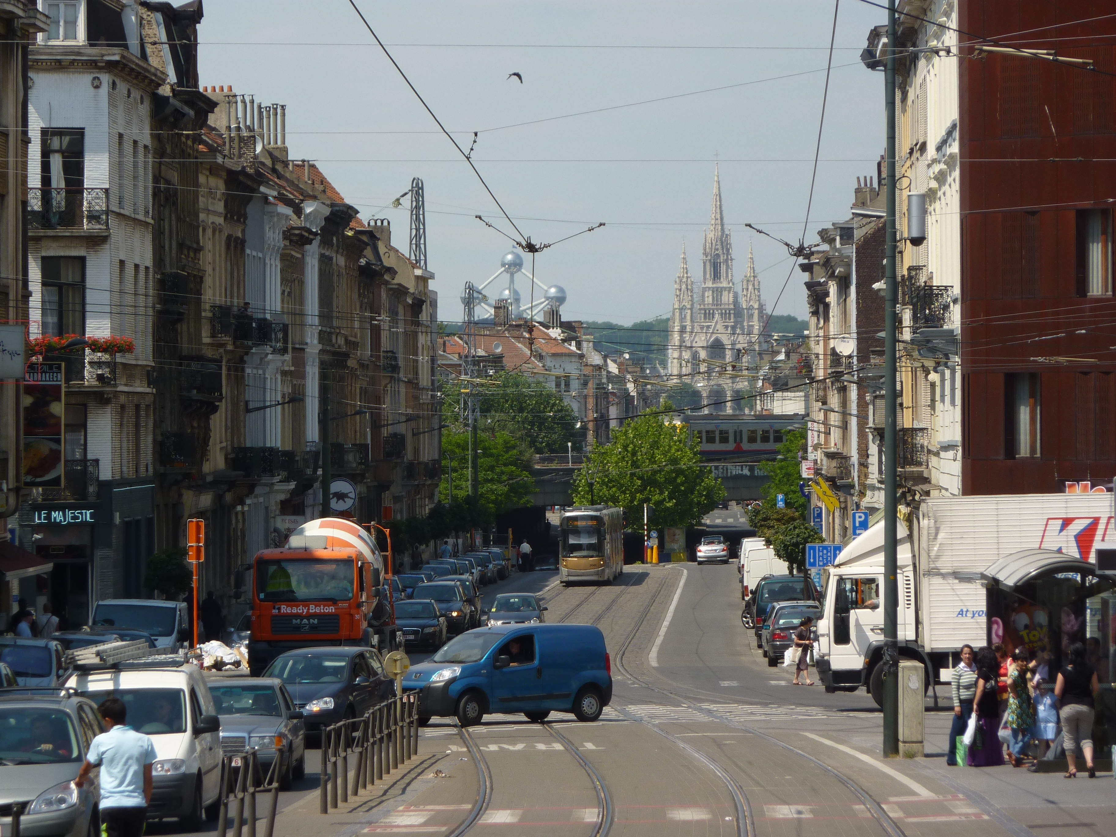 L'église Notre-Dame de Laeken et l'Atomium vus depuis la place Liedts à Schaerbeek, Bruxelles, Belgique.